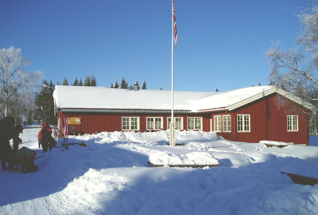 Sinober